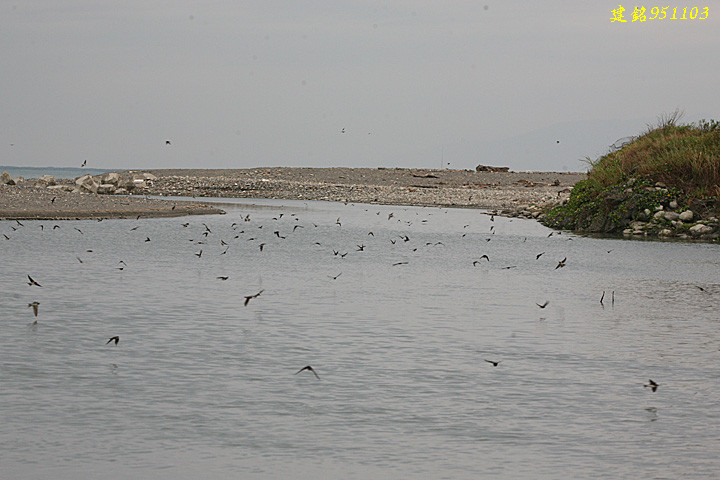 太平溪出海口,出現大群的燕子。於951103拍於台東太平溪.